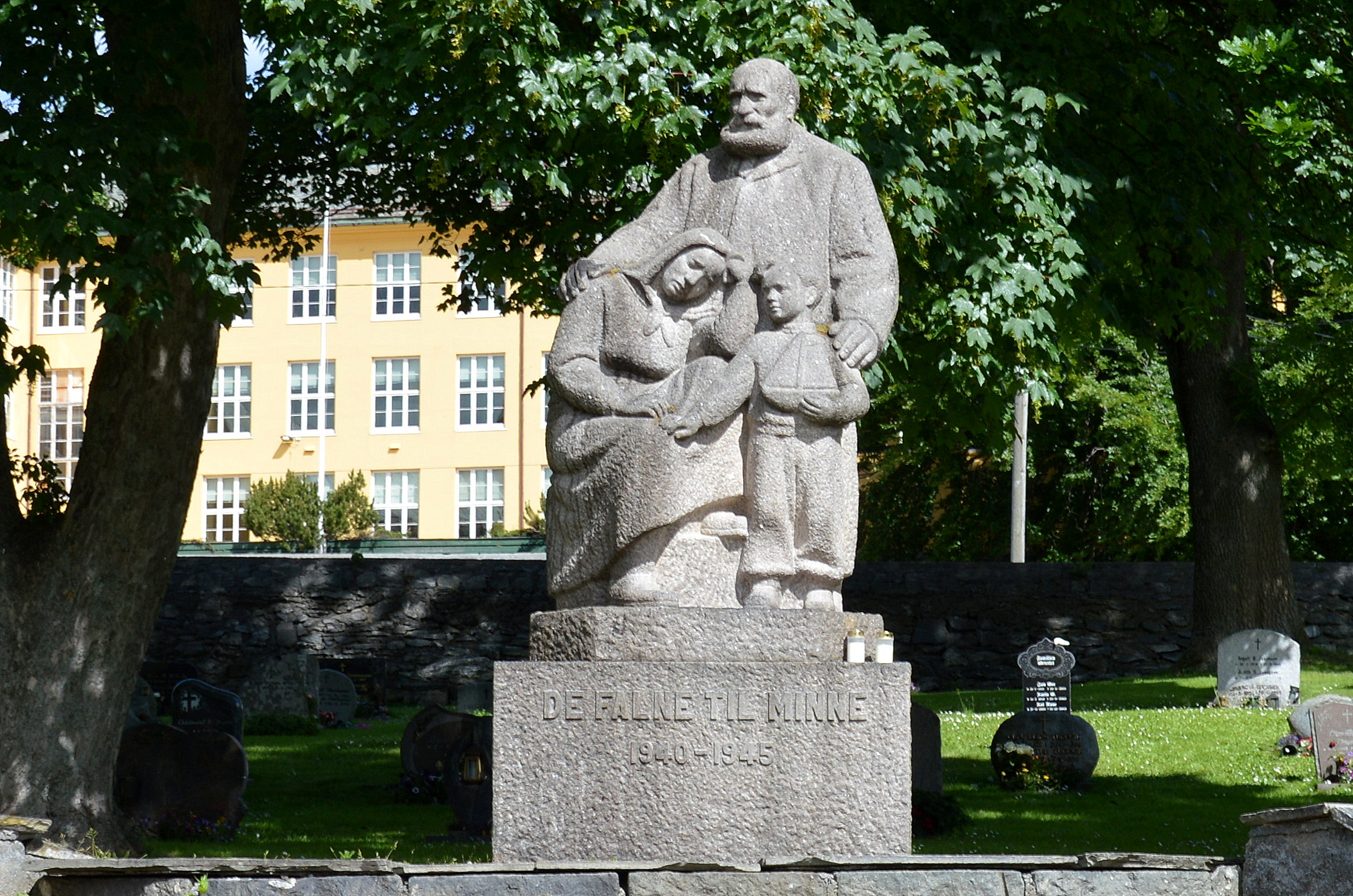 Gefallenen Denkmal in Alesund